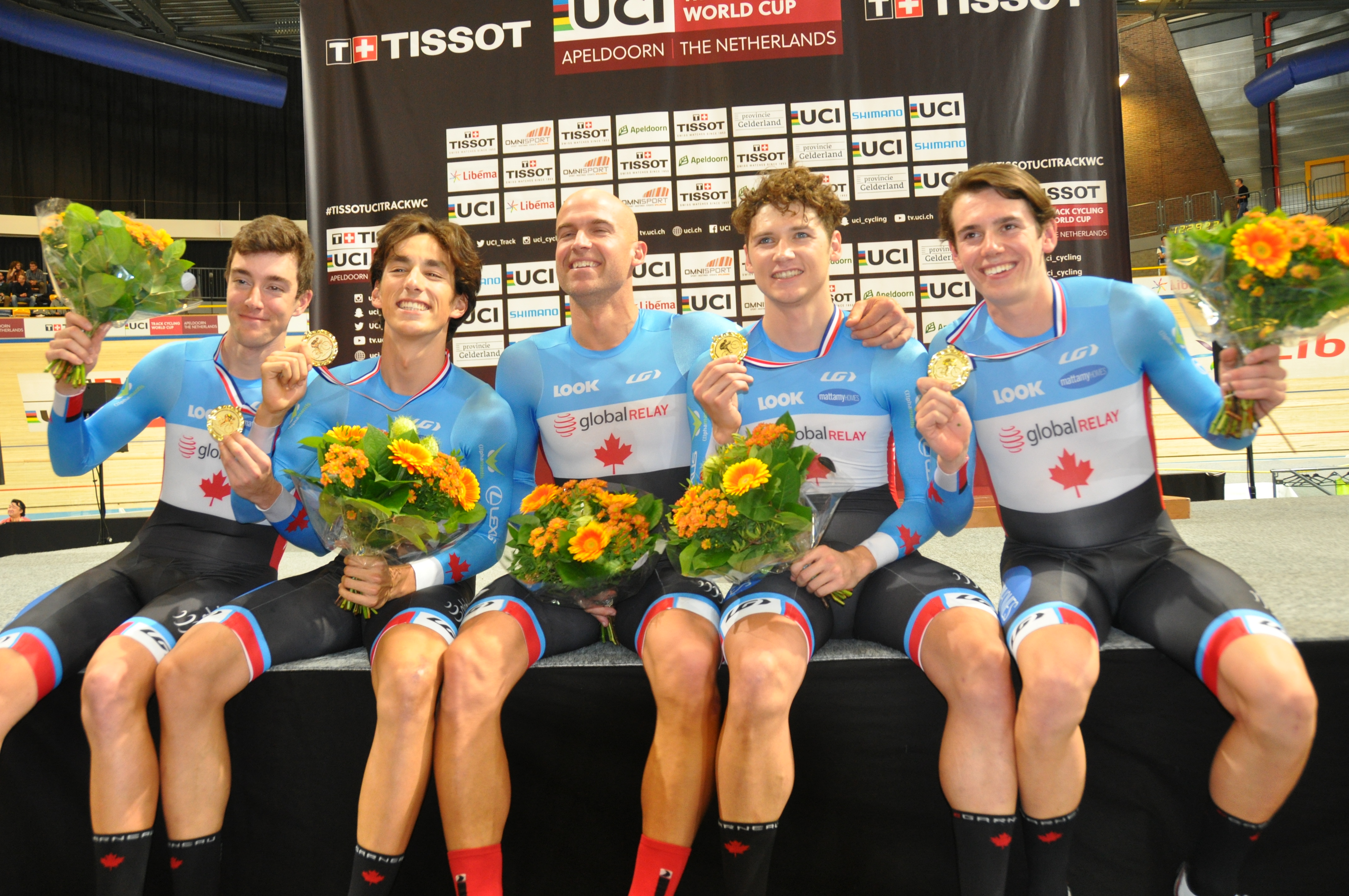 Team Mannschaftsverfolgung Kanada, Goldmedaille in der Mannschaftsverfolgung, v.l.n.r.: Bayley Simpson, Adam Jamieson, Ed Veal, Aidan Caves, Jay Lamoureux